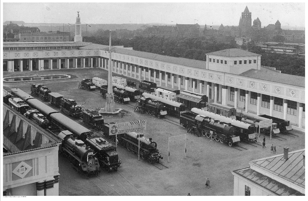 Międzynarodowa Wystawa Komunikacji i Turystyki 1930 w Poznaniu, dział kolejowy